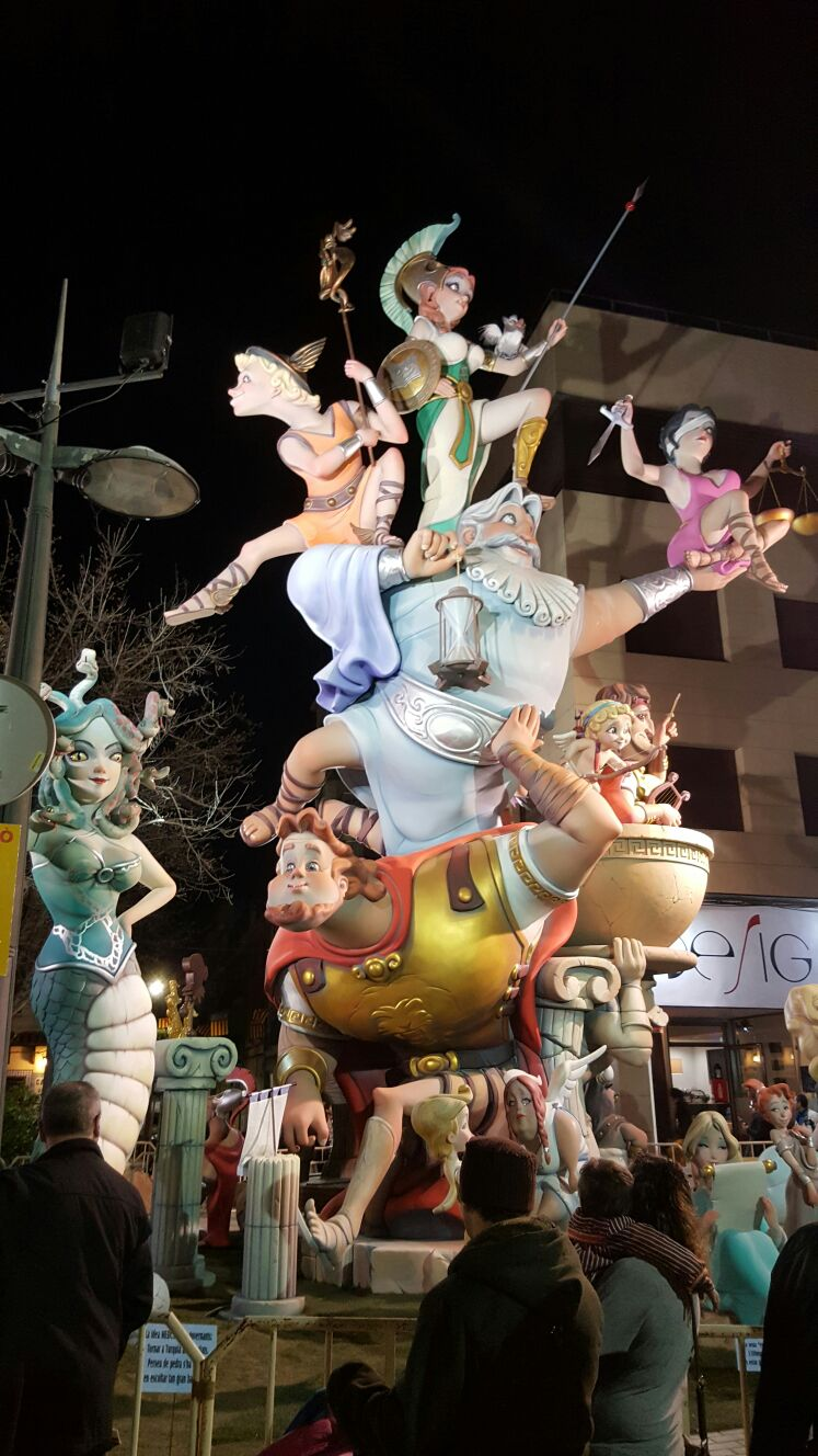 Fallas This is a photography of a Folklore festival in Spain (Wikidata id Q23653026).